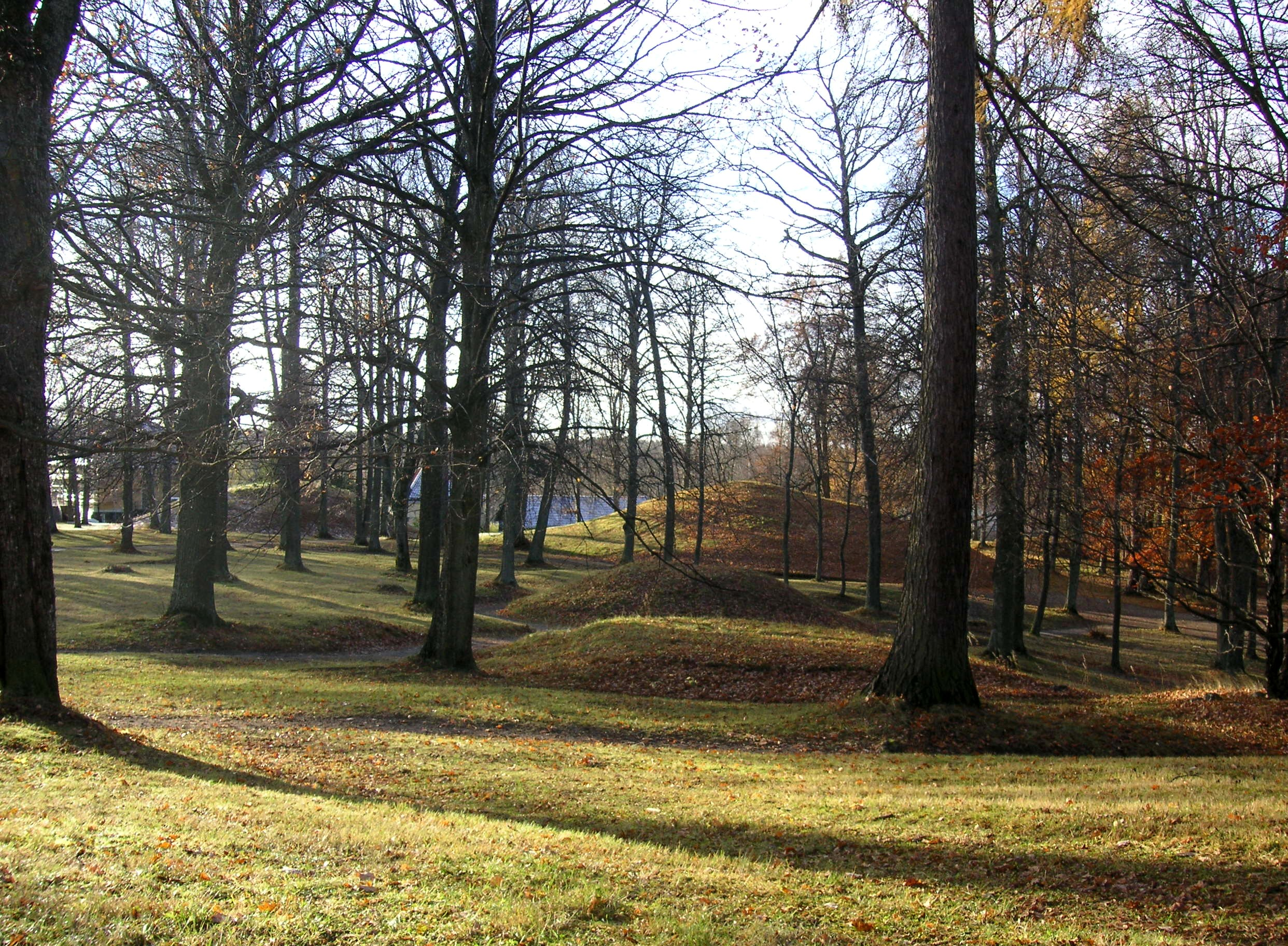 Gravfält "Hundhamra" vid Norsborgs herrgård i Botkyrka kommun Sverige. I bakgrunden syns Mälaren.